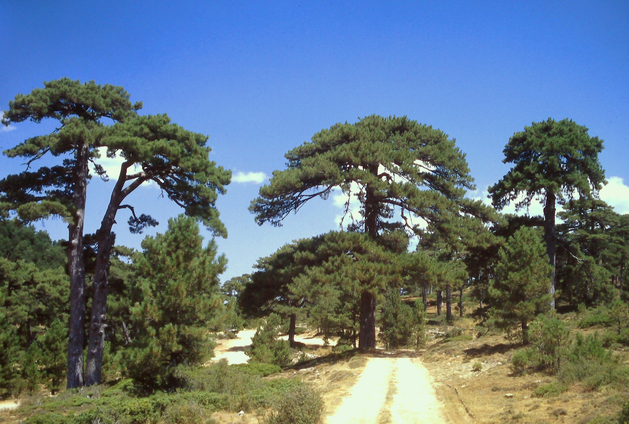 Pinares de Pinus nigra en Puerto Llano, entre los que se cuentan los árboles más longevos de España